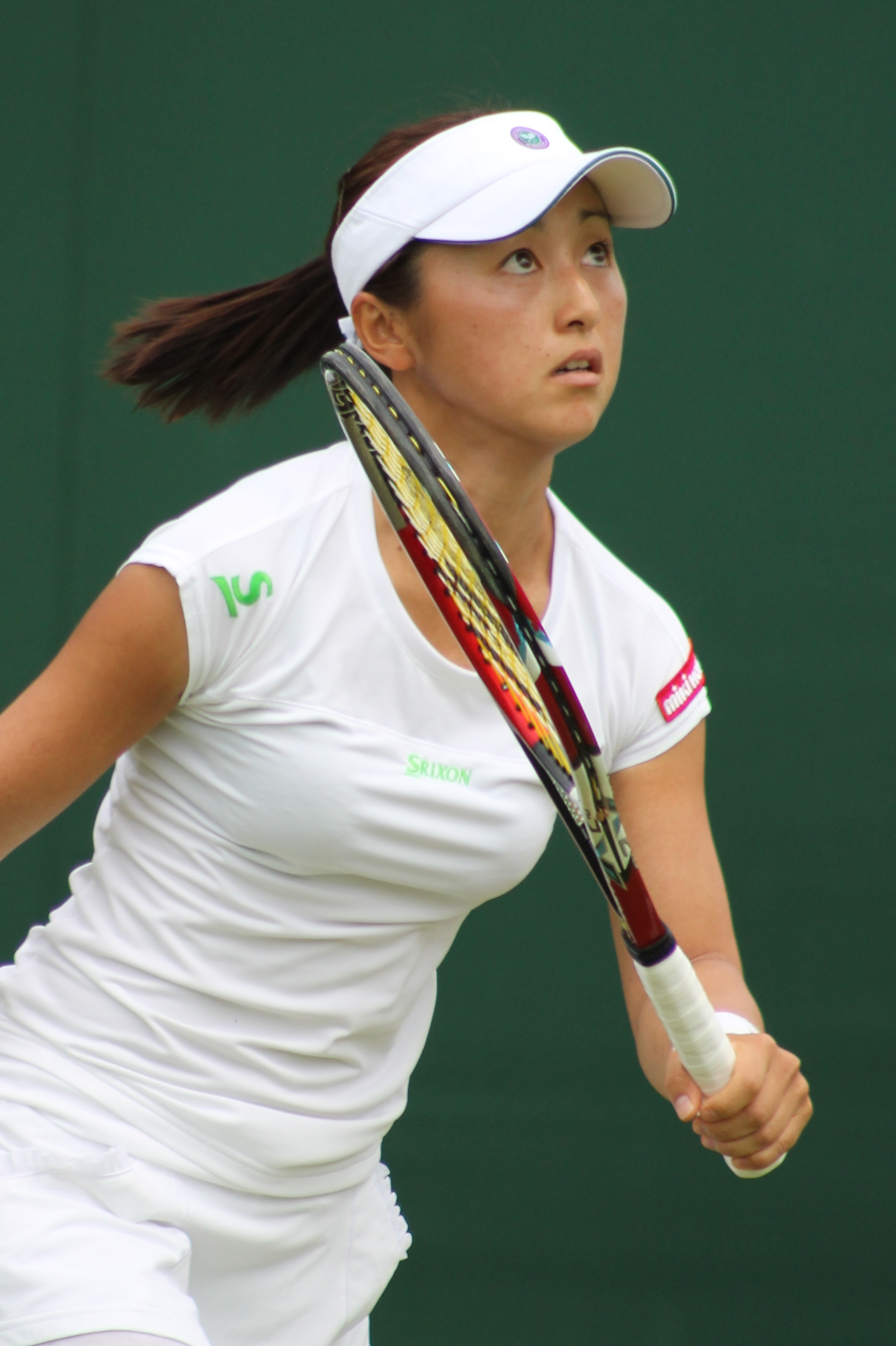 Doi WM14 (1)